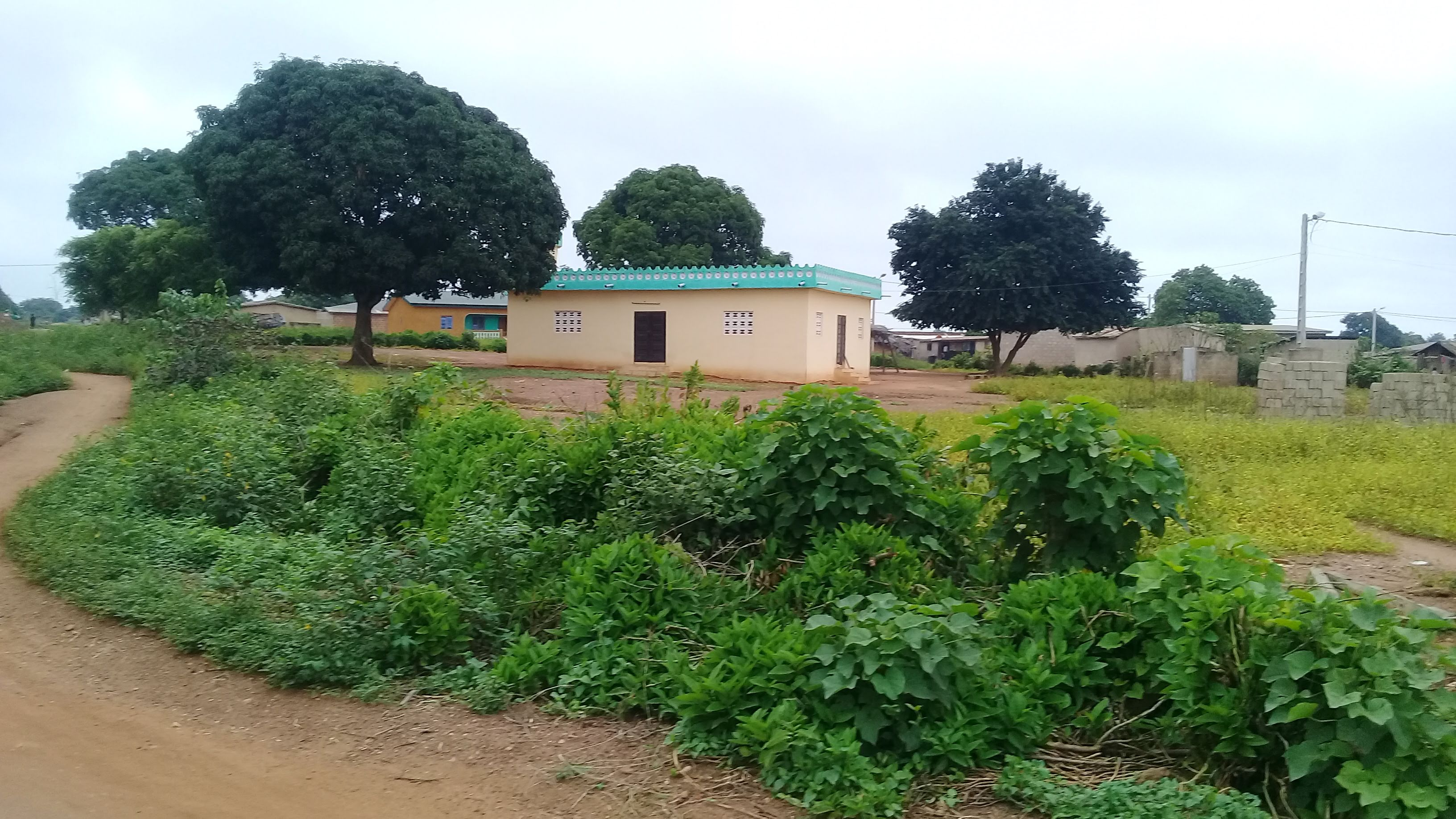 Torossanguéhi est une localité du nord-est de la Côte d'Ivoire